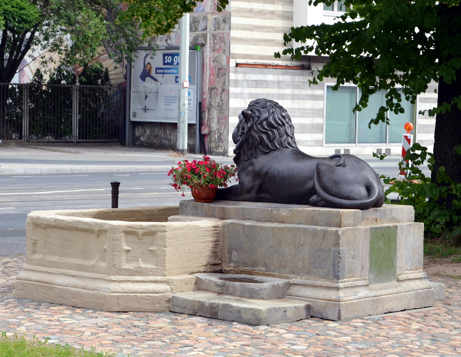 Braunschweig, Löwenbrunnen: Ansicht schräg von hinten (im Hintergrund die Fallersleber Straße).